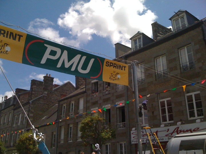 Banderole indiquant le sprint intermédiaire situé à Vassy lors de la 6e étape du Tour de France 2011.